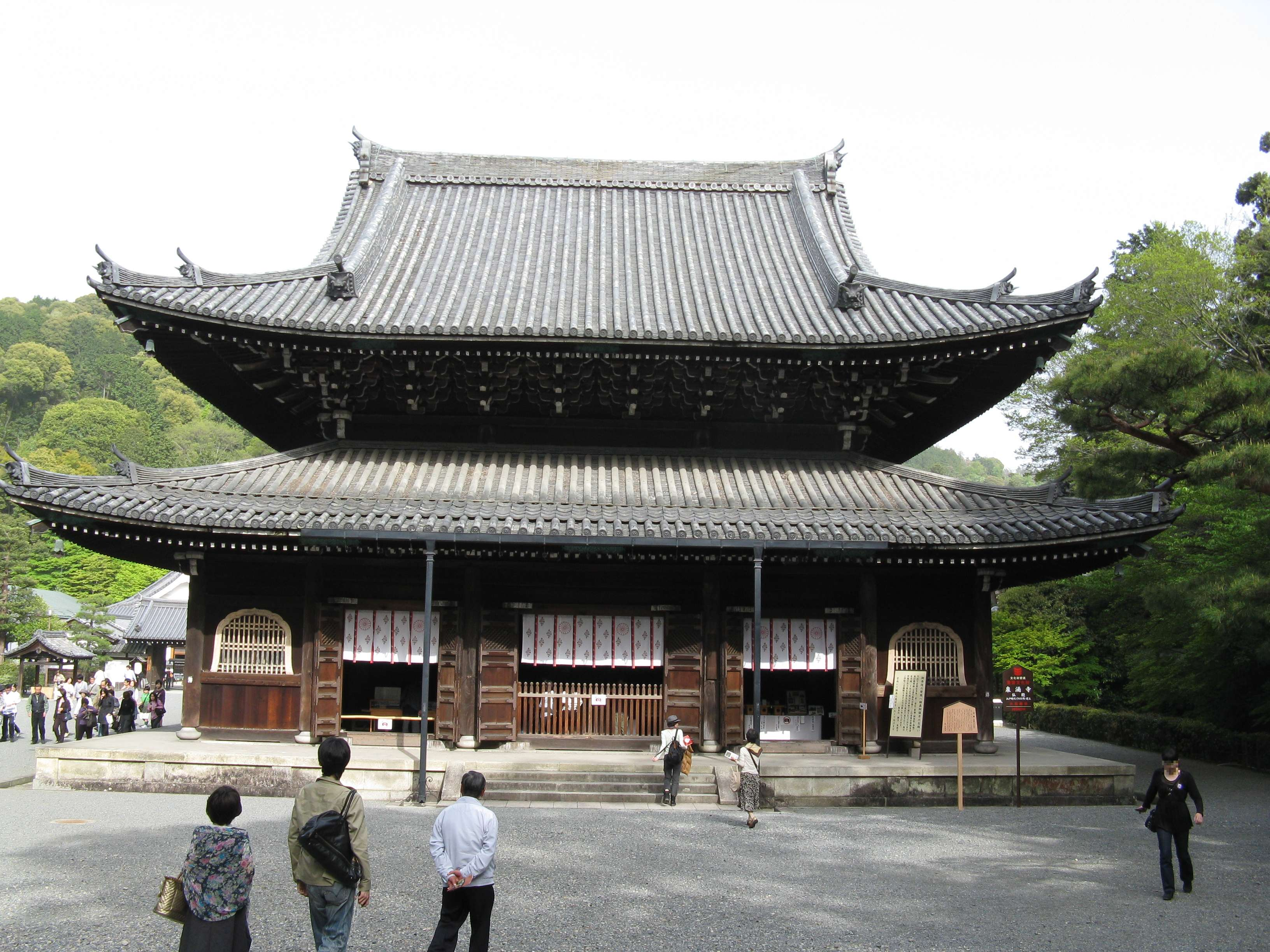 泉涌寺 仏殿